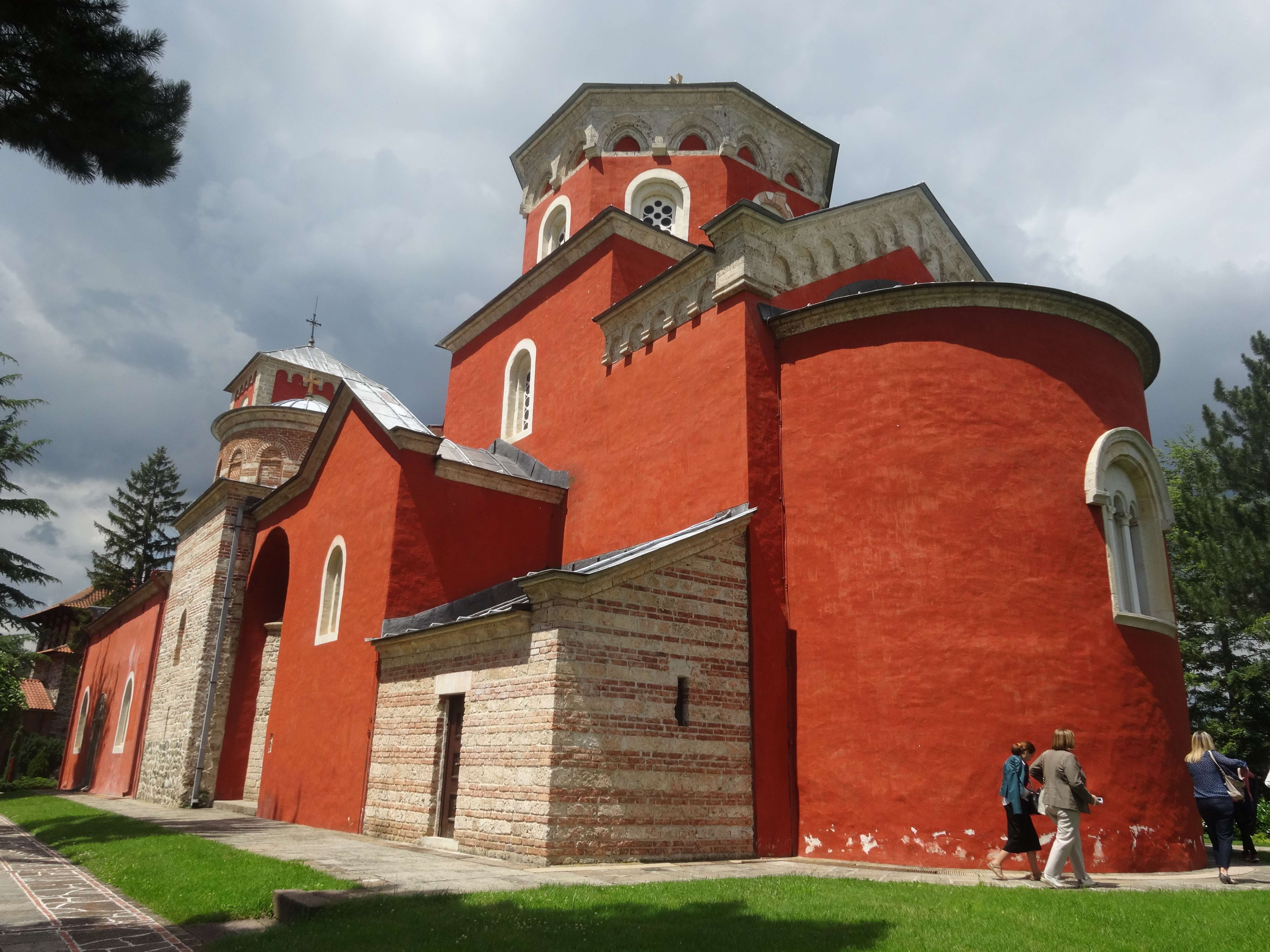 Жича је српски средњовековни манастир из прве половине 13. века, који се налази у близини Краљева. Подигао ју је први краљ Србије, Стефан Немањић.